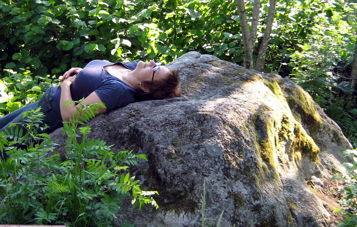 Lopaičiai, Sveikatos akmuo Foto: Algirdas, 2007-06-12